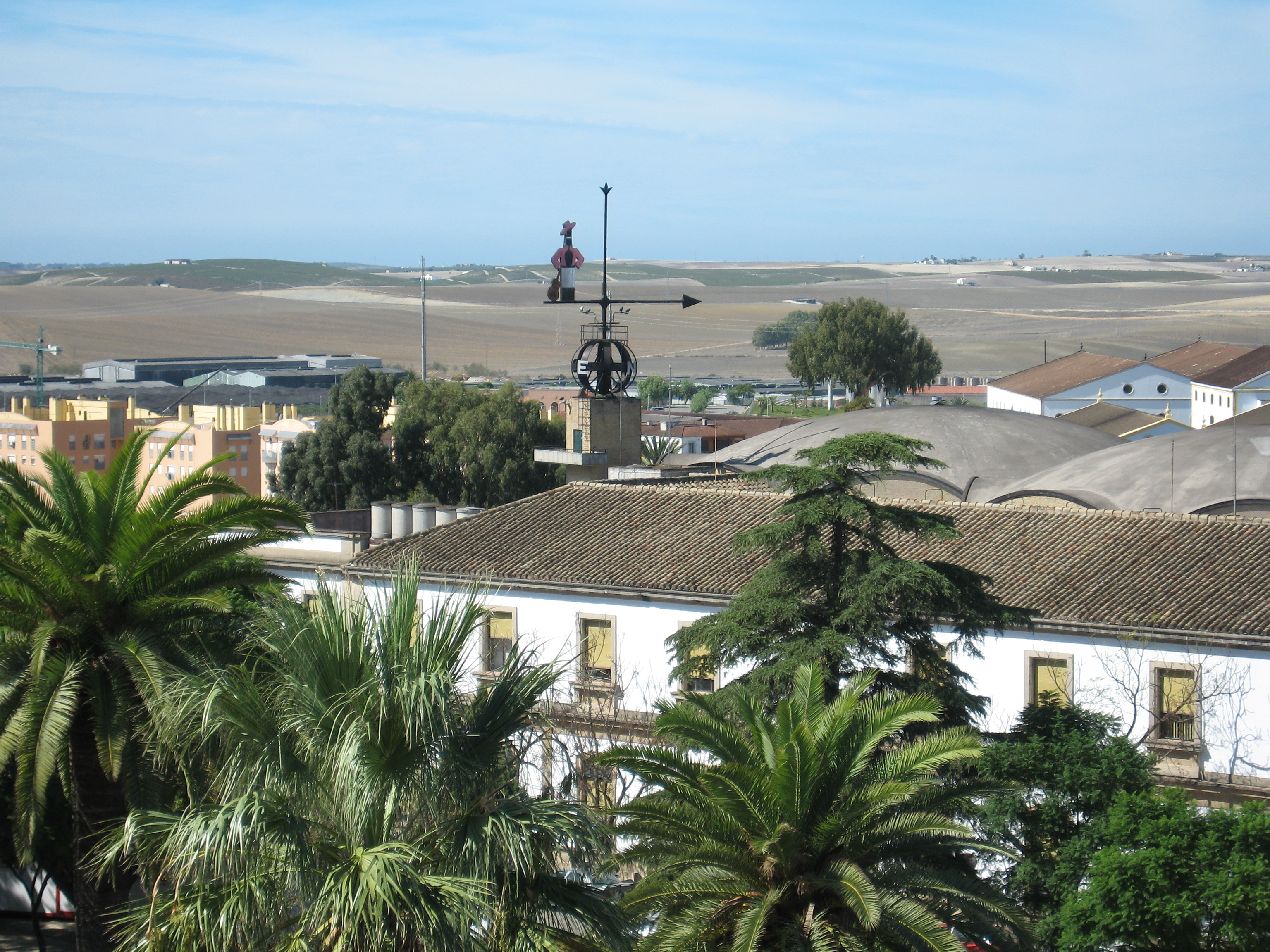 Vista de las bodegas González-Byass y la campiña de Jerez desde el Palacio de Villavicencio, en el Alcázar de Jerez, Spain. Incluye veleta más grande del mundo que funciona (record Guiness) [Guiness record of the largest weather vane that works]